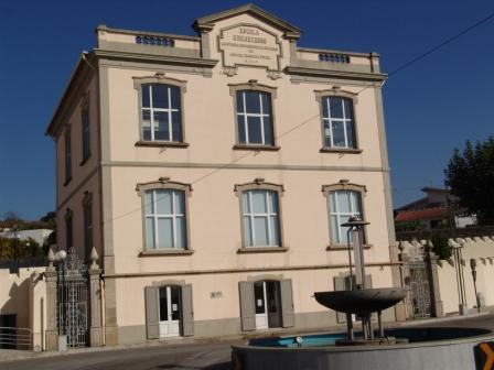 Sede da Junta de Freguesia de Cesar Oliveria de Azeméis Portugal